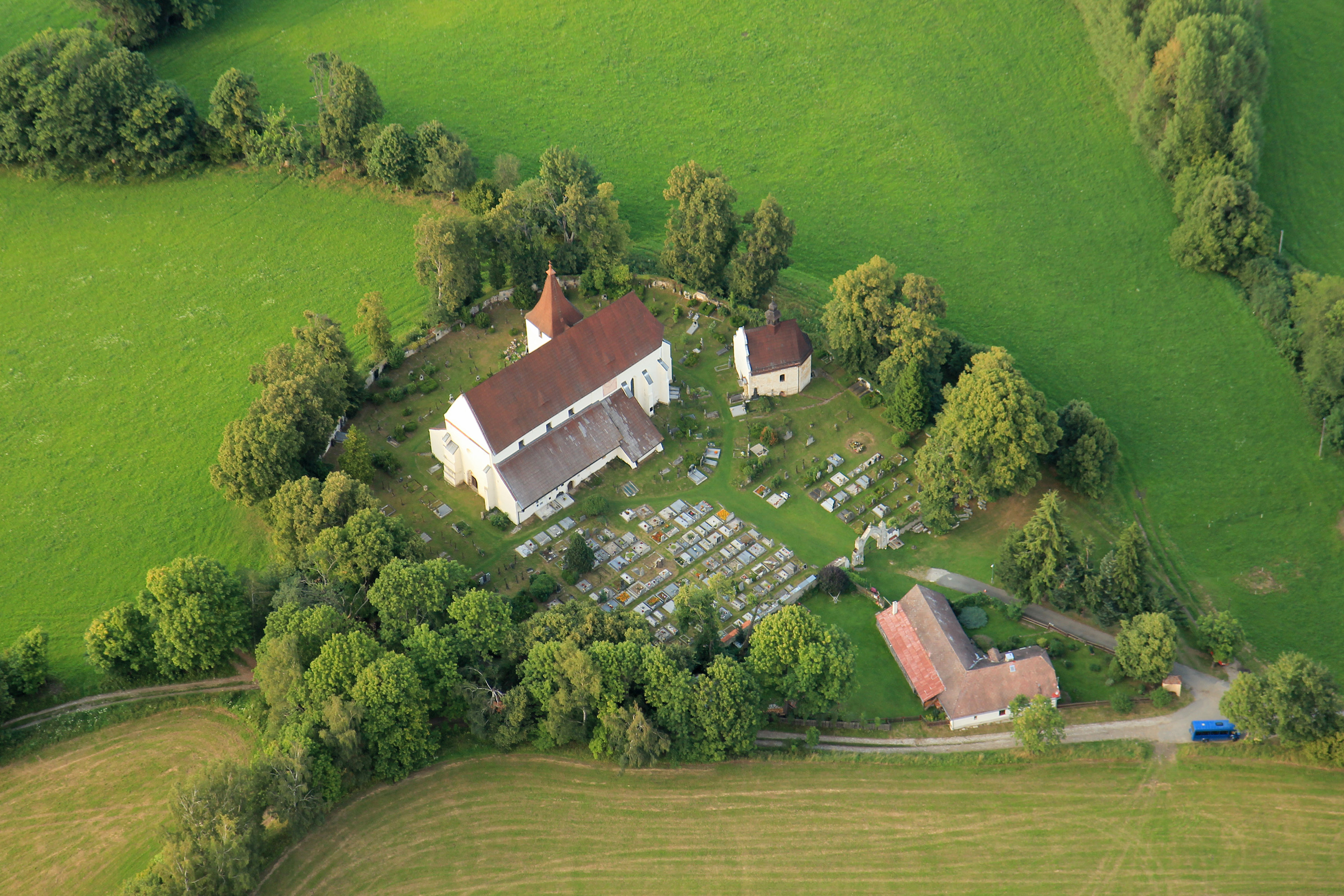 Kostel sv. Mikuláše (Kašperské Hory), 1,5 km SZ od náměstí, Kašperské Hory